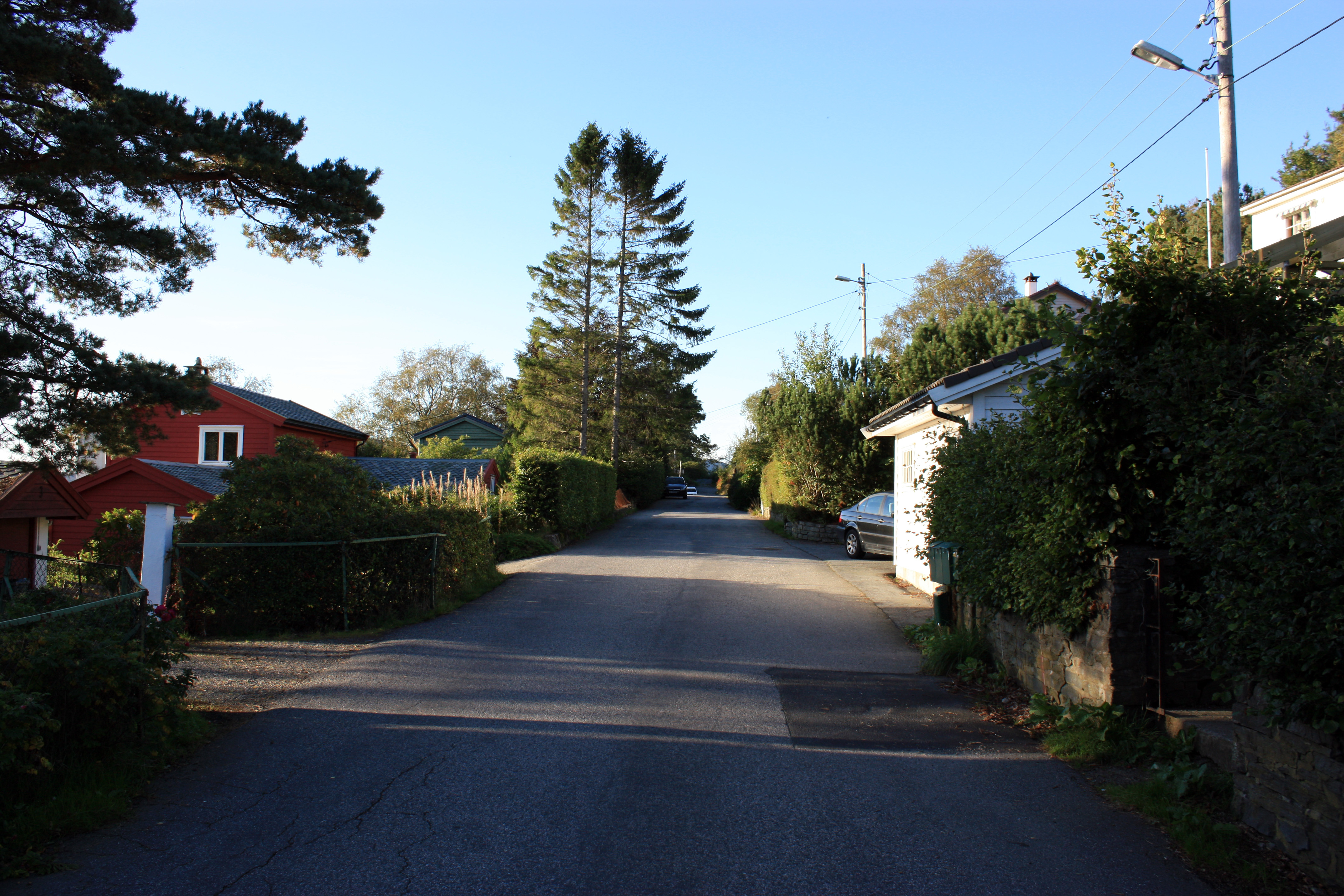 Klokkarlia, Fana, Bergen.